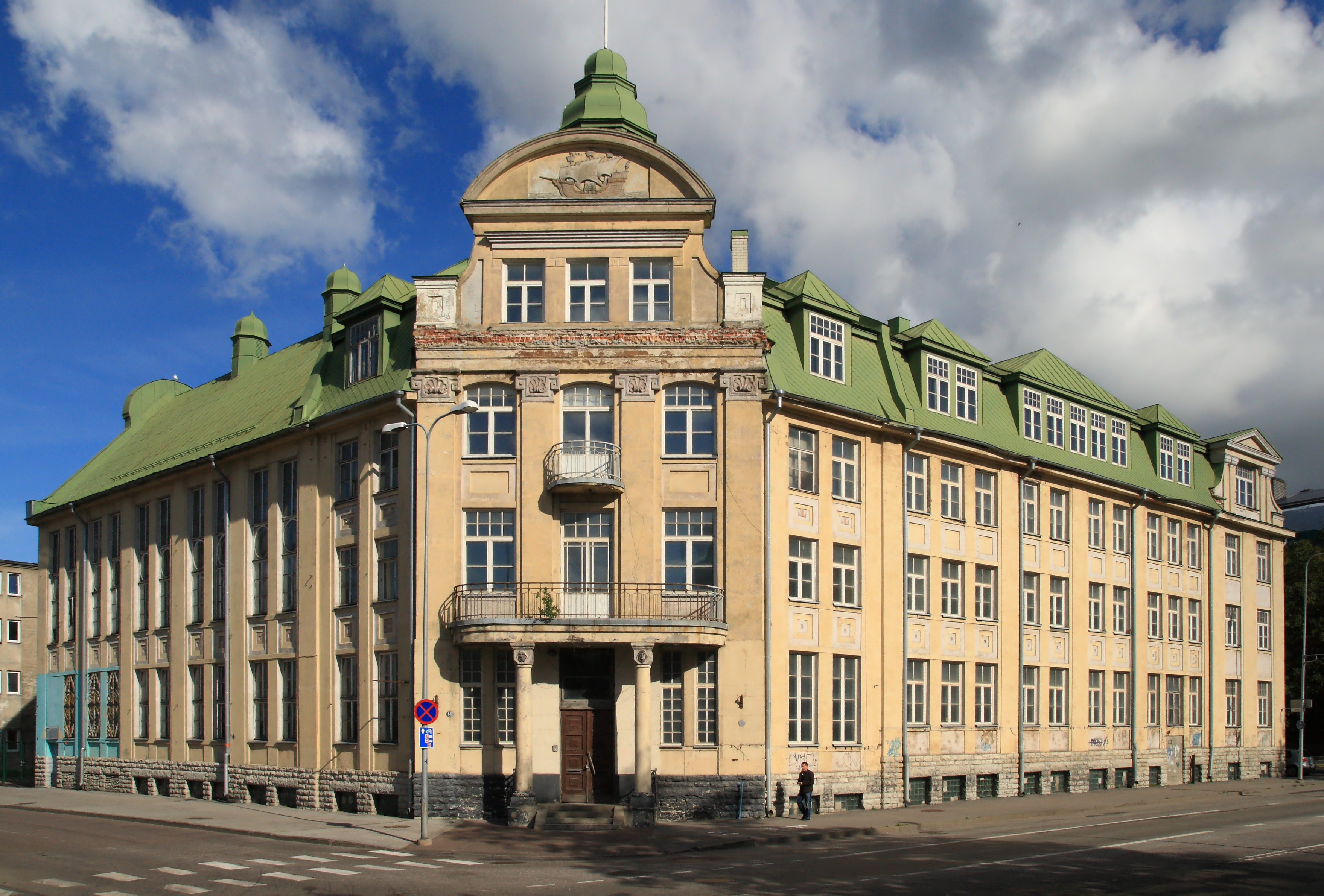 Tallinna Meremeeste Kodu, 1926